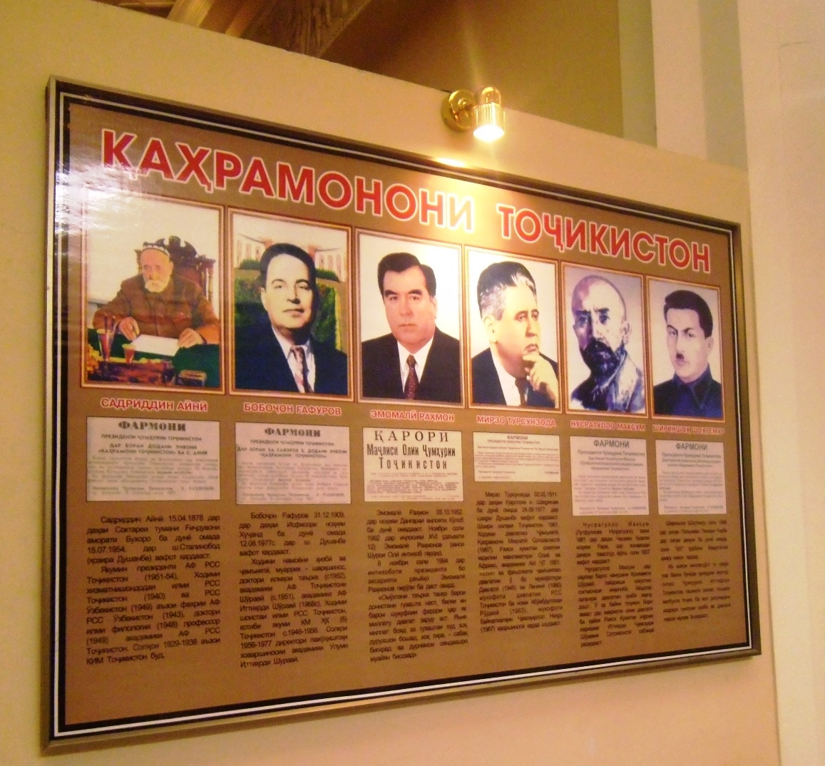 Музейные экспонаты в Согдийской области. Портреты Героев Таджикистана. Тоҷикӣ: Экспонатҳои осорхонаҳои вилояти Суғд. Аксҳои Қаҳрамонони Тоҷикистон